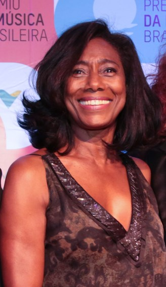 Glória Maria e Leilane Neubarth durante o 25º Prêmio da Música Brasileira no Theatro Municipal.